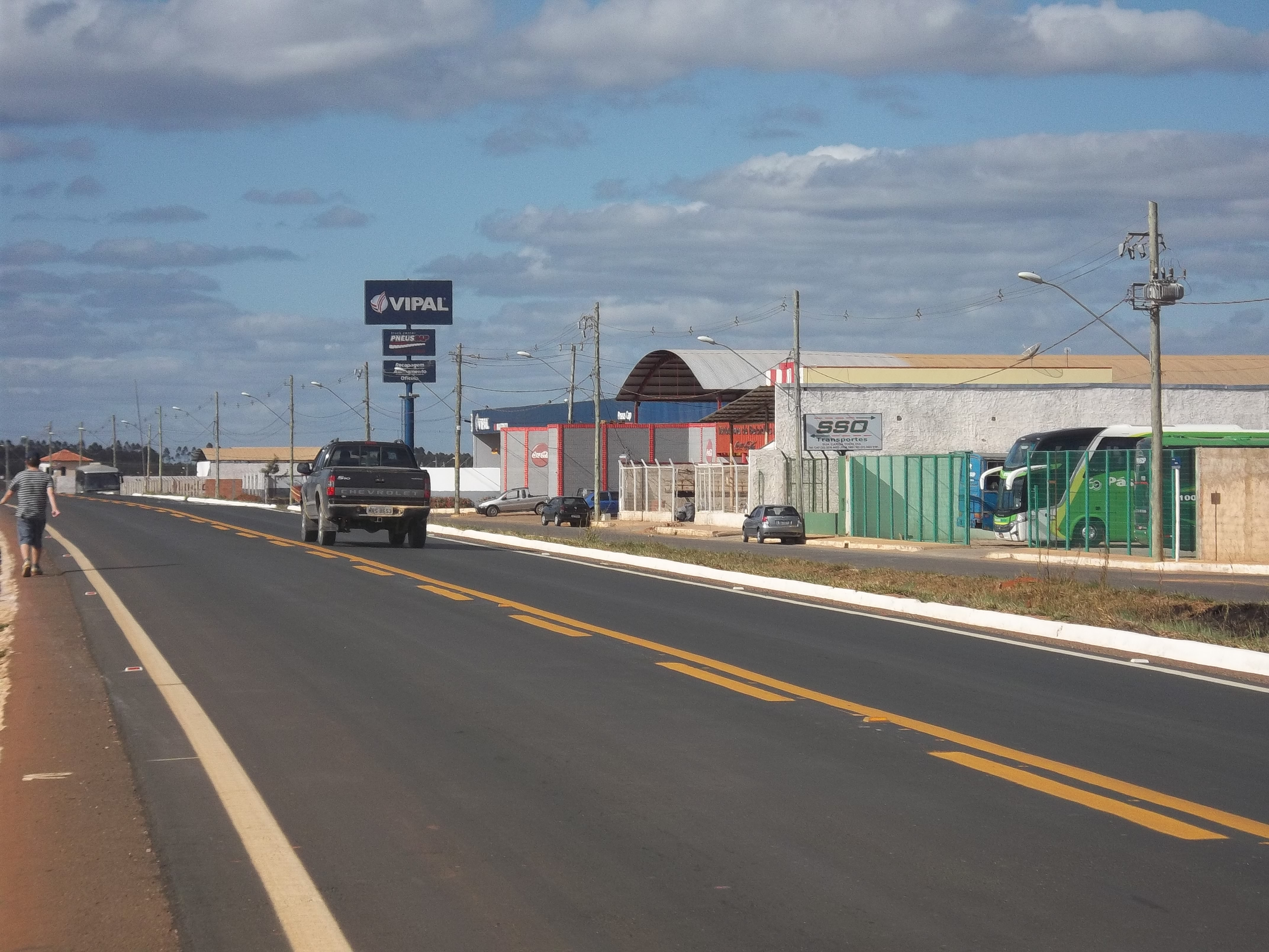 Anel Rodoviário, na parte norte, abrigando empresas de turismo, bebidas e oficinas.